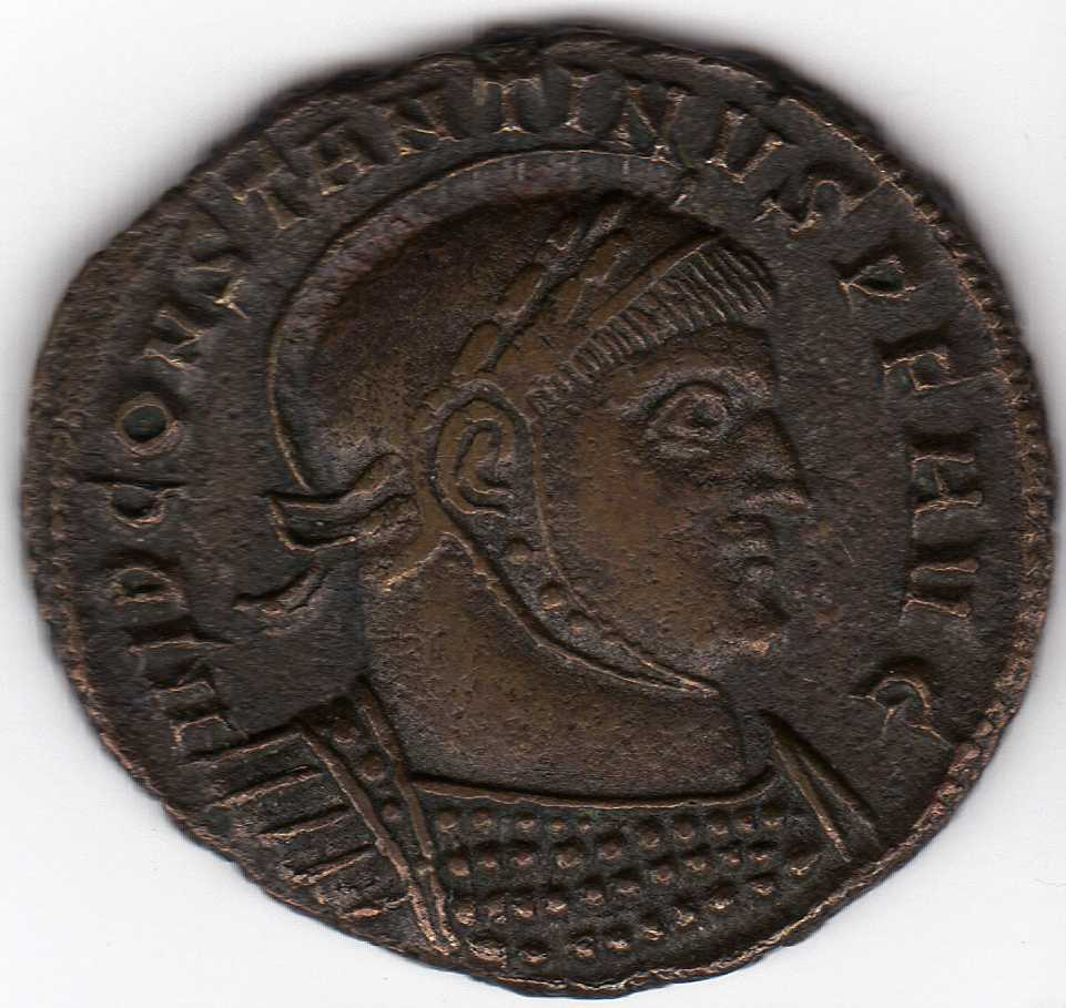 Centenionalis římského císaře Konstantina I. Velikého (306-337), ražený po Milánském ediktu (r. 313) v Siscii (Sisak, býv. Jugoslávie)